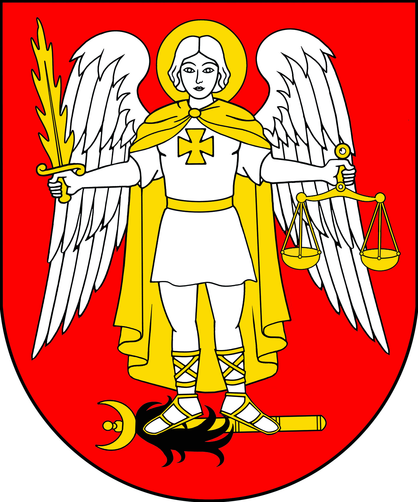 Herb gminy Telatyn